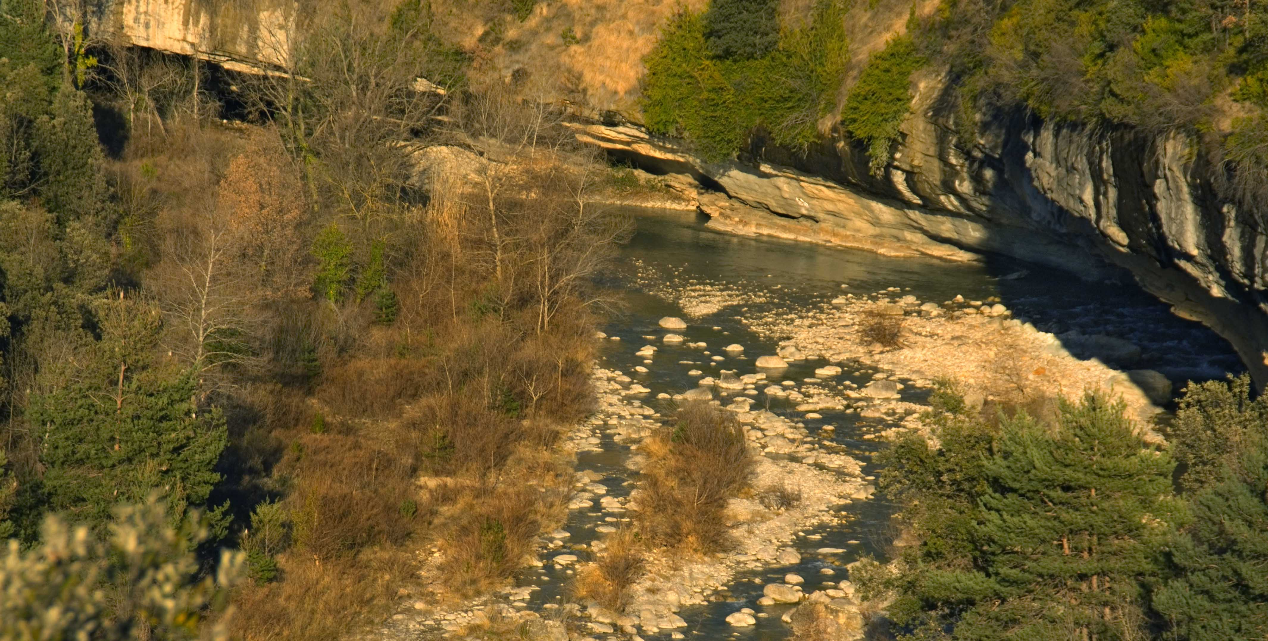 Meandre situat al sud de la Pobla de Roda, cap del municipi d'Isàvena, a la Baixa Ribagorça (Franja de Ponent) d'Aragó.